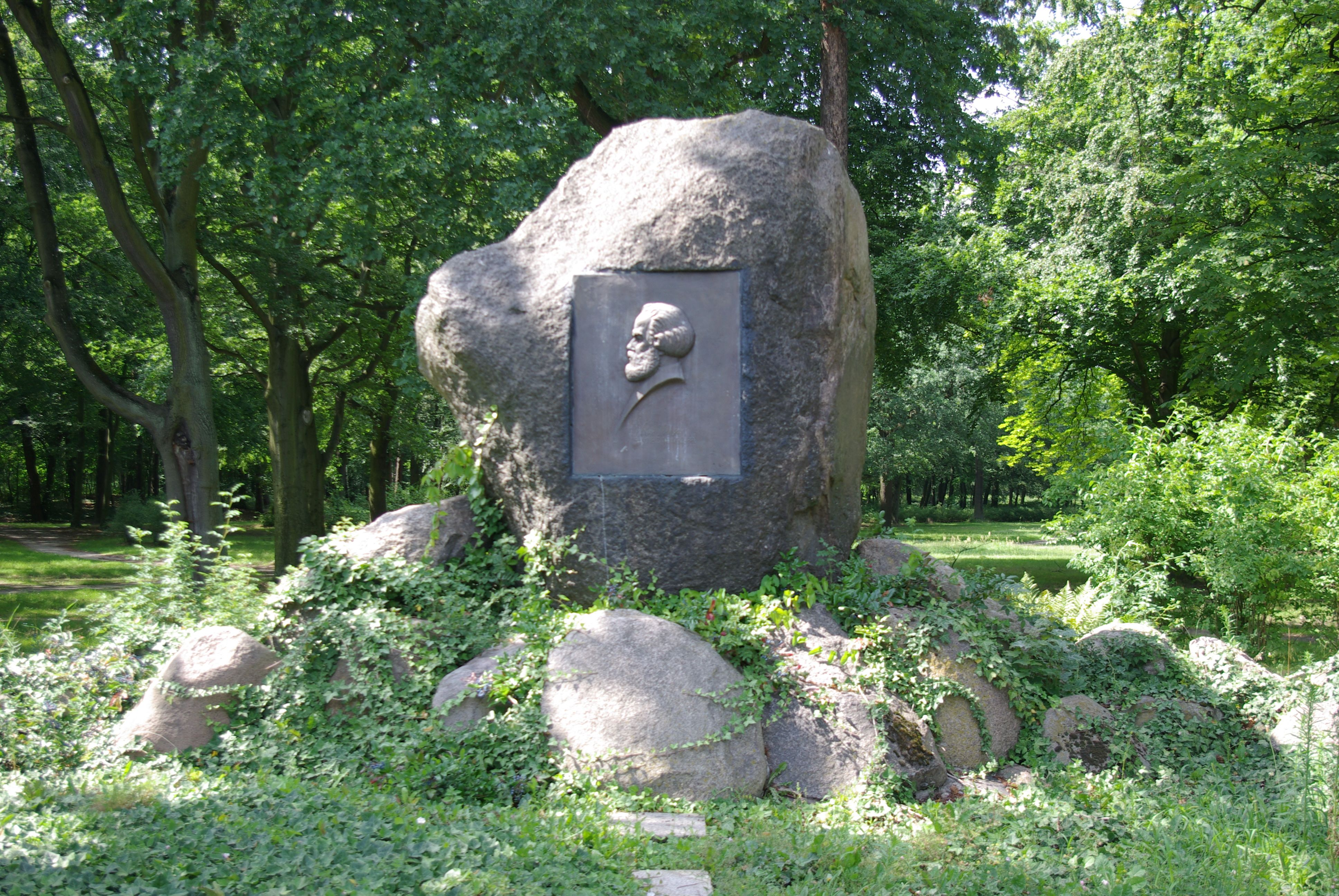 Fürstenwalde/Spree in Brandenburg. Das Karl-Marx-Denkmal in Fürstenwalde steht in der Karl-Marx-Straße und steht nter Denkmalschutz.